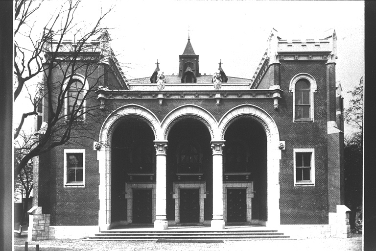 関東大震災後の三田大講堂、慶應義塾大講堂。大正14年（1925年）竣工。